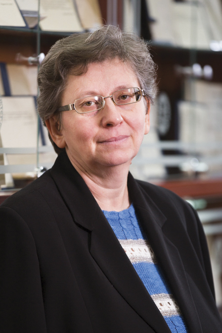 Српски (ћирилица): Проф. др Снежана Бркић